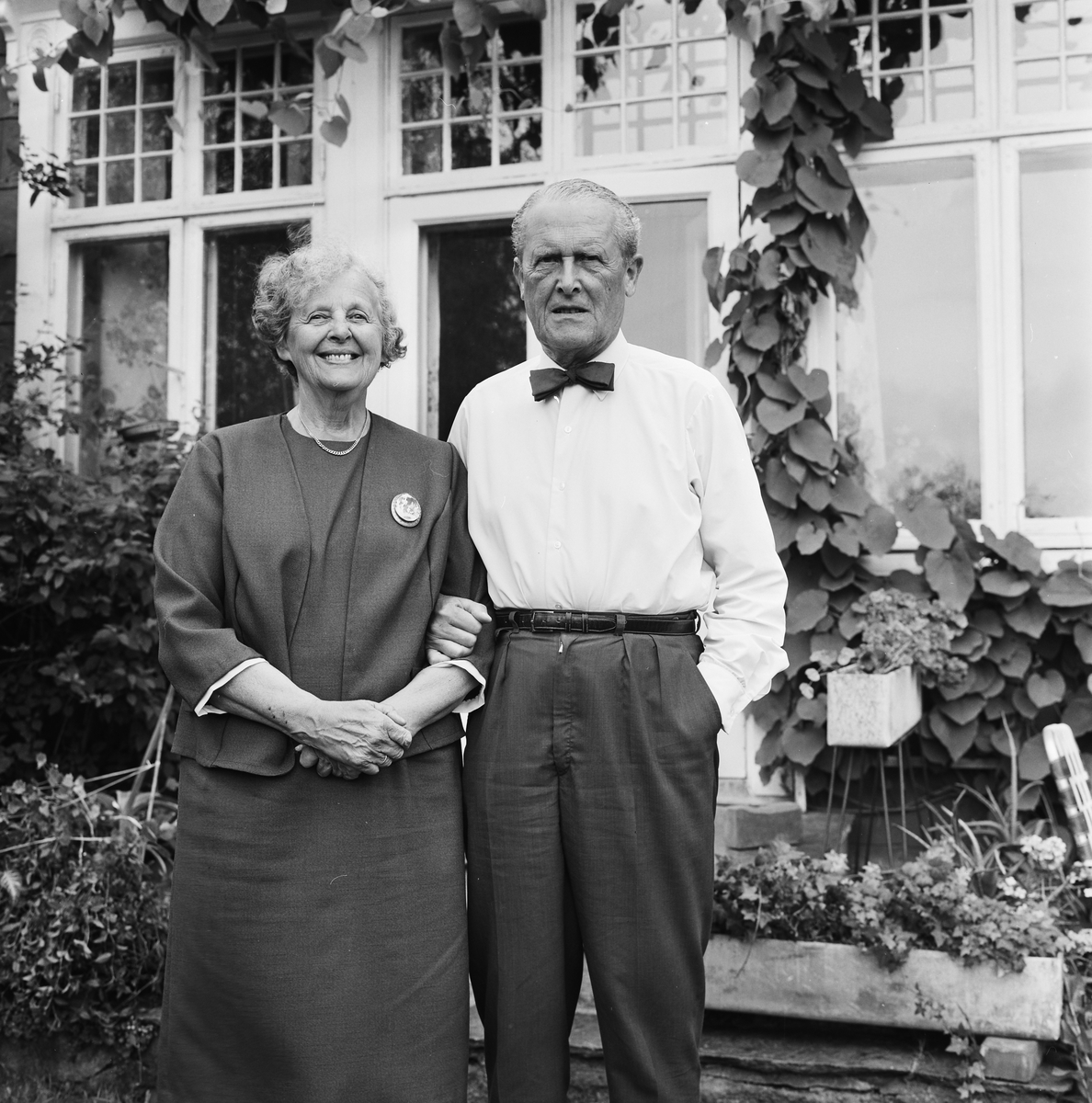 Johan Bernhard Hjort (1895-1969) var en norsk høyesterettsadvokat. Han var grunnlegger og nestleder av det norske fascistpartiet Nasjonal Samling fra 1933. I 1937 brøt han med Quisling og meldte seg ut av partiet. I 1941 ble han arrestert av Gestapo og etter hvert sendt til Tyskland.